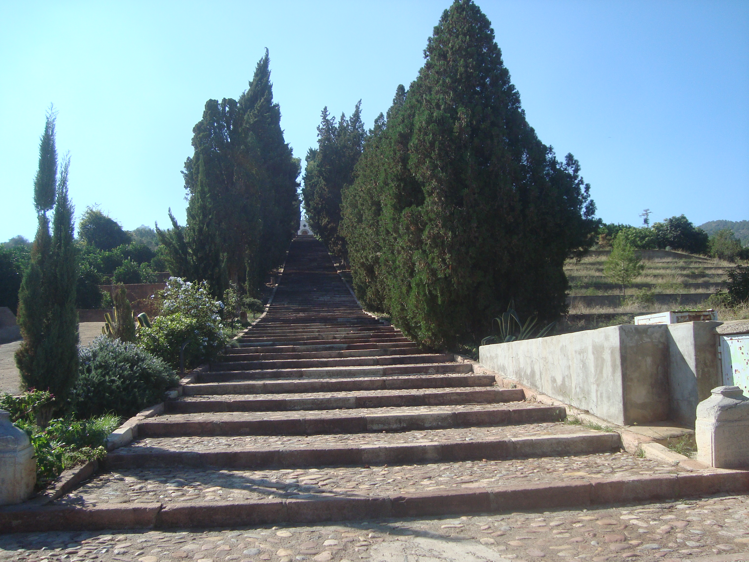 Ermita de la Mare de Déu del Bon Succés (Benifairó de les Valls). El temple té la condició de Bé de Rellevància Local segons la Disposició Addicional Quinta de la Llei 5/2007, de 9 de febrer, de la Generalitat, de modificació de la Llei 4/1998, d'11 de juny, del Patrimoni Cultural Valencià (DOCV Núm. 5.449 / 13.02.2007). 12.058-003.